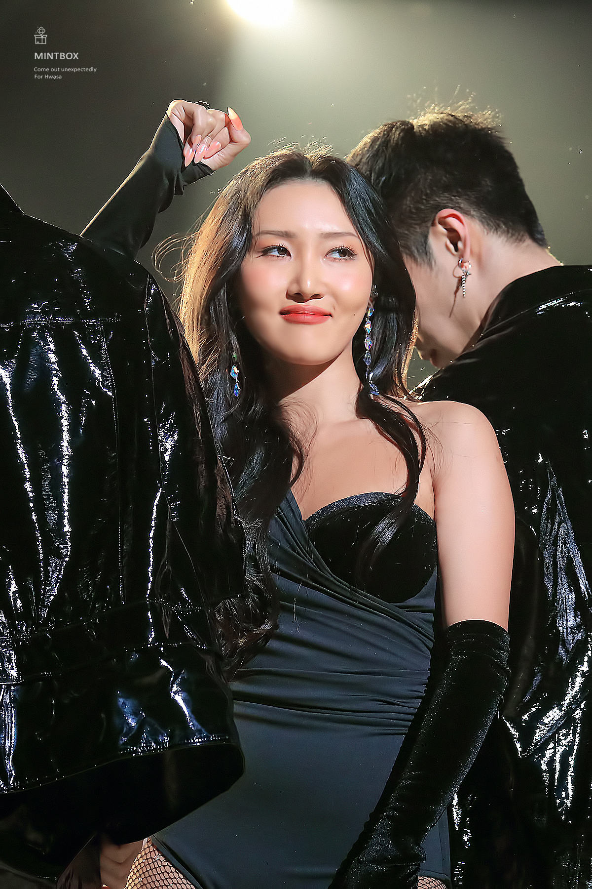 200108 가온 뮤직 어워즈 멍청이 무대 중인 화사